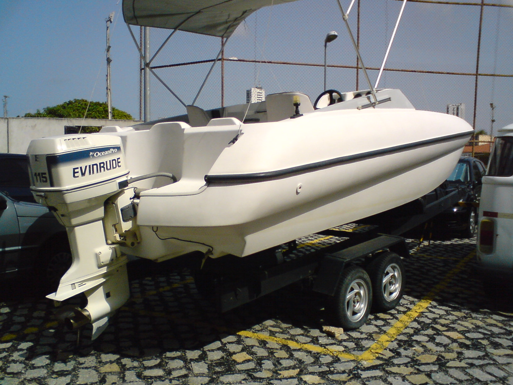 Lancha, visão traseira